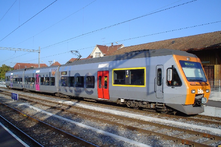 BLS, ehemals Berner Alpenbahngesellschaft Bern–Lötschberg–Simplon, NINA Regionalzug Serie RABe 525 mit Totalwerbung des Zentrum Paul Klee in Kerzers im Jahre 2005.